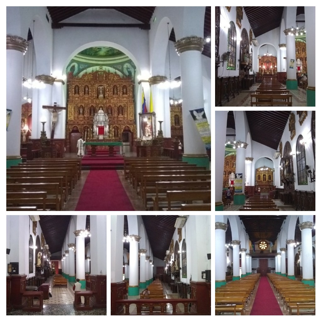 Vista interior de la Catedral de Guanare y sus tres naves. Y retablos.